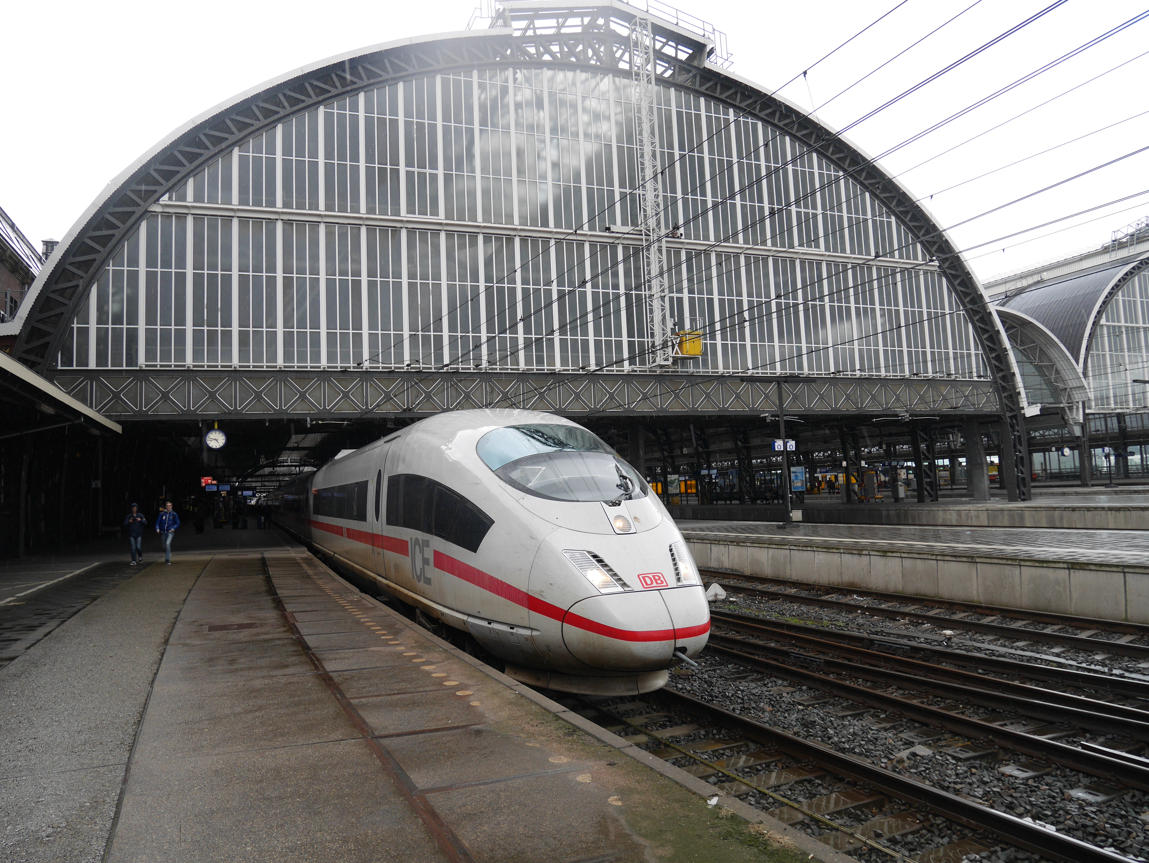 ICE International im Amsterdamer Hbf.